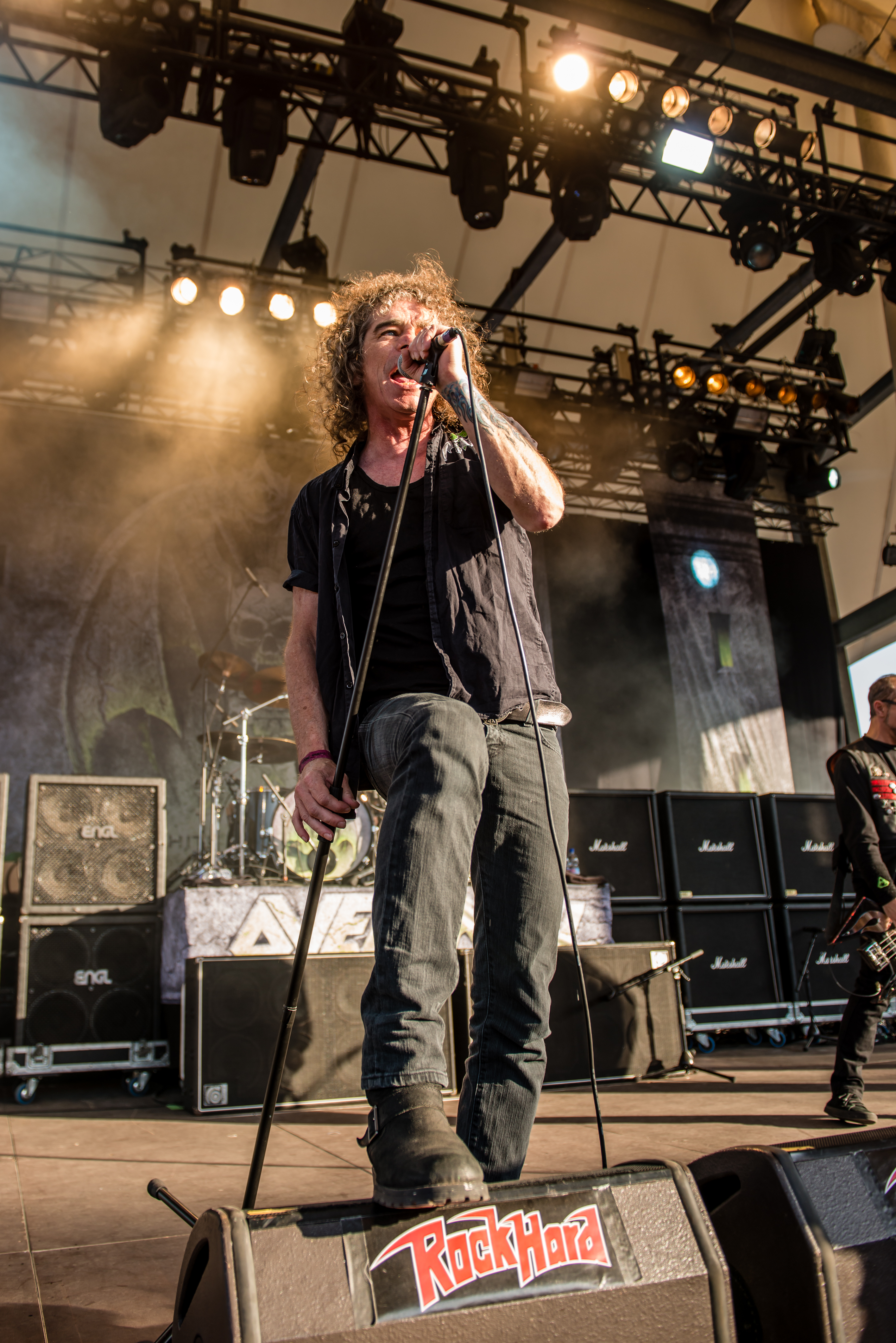 'Rock Hard Festival 2015; Gelsenkirchen Amphitheater': 'Overkill'